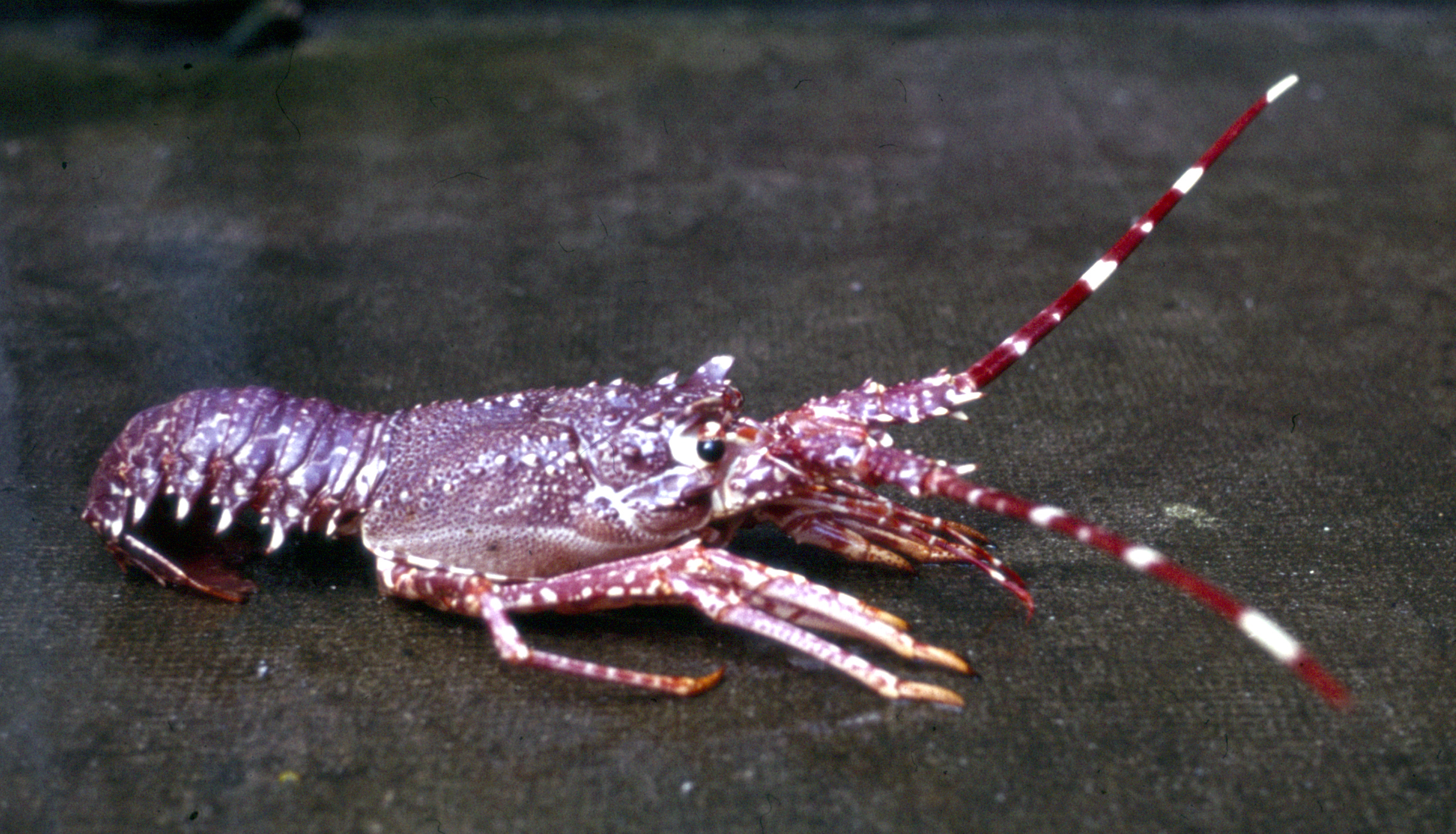 Eine Languste in Roscoff